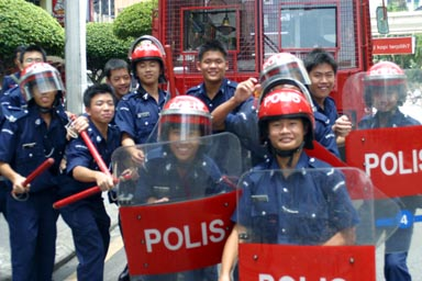 Bakal pelapis anggota FRU. Anggota-anggota Kadet Polis menggayakan peralatan dan kelengkapan FRU.